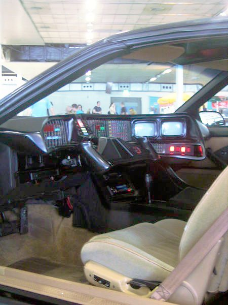 Cockpit des Nachbaus von K.I.T.T. aus der Serie Knight Rider. so gesehen auf der Science Fiction-Convention "Screen Heroes" in Utrecht 2005.